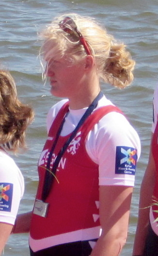 Elisabeth (Ellen) Hogerwerf, Ruder-EM 2016